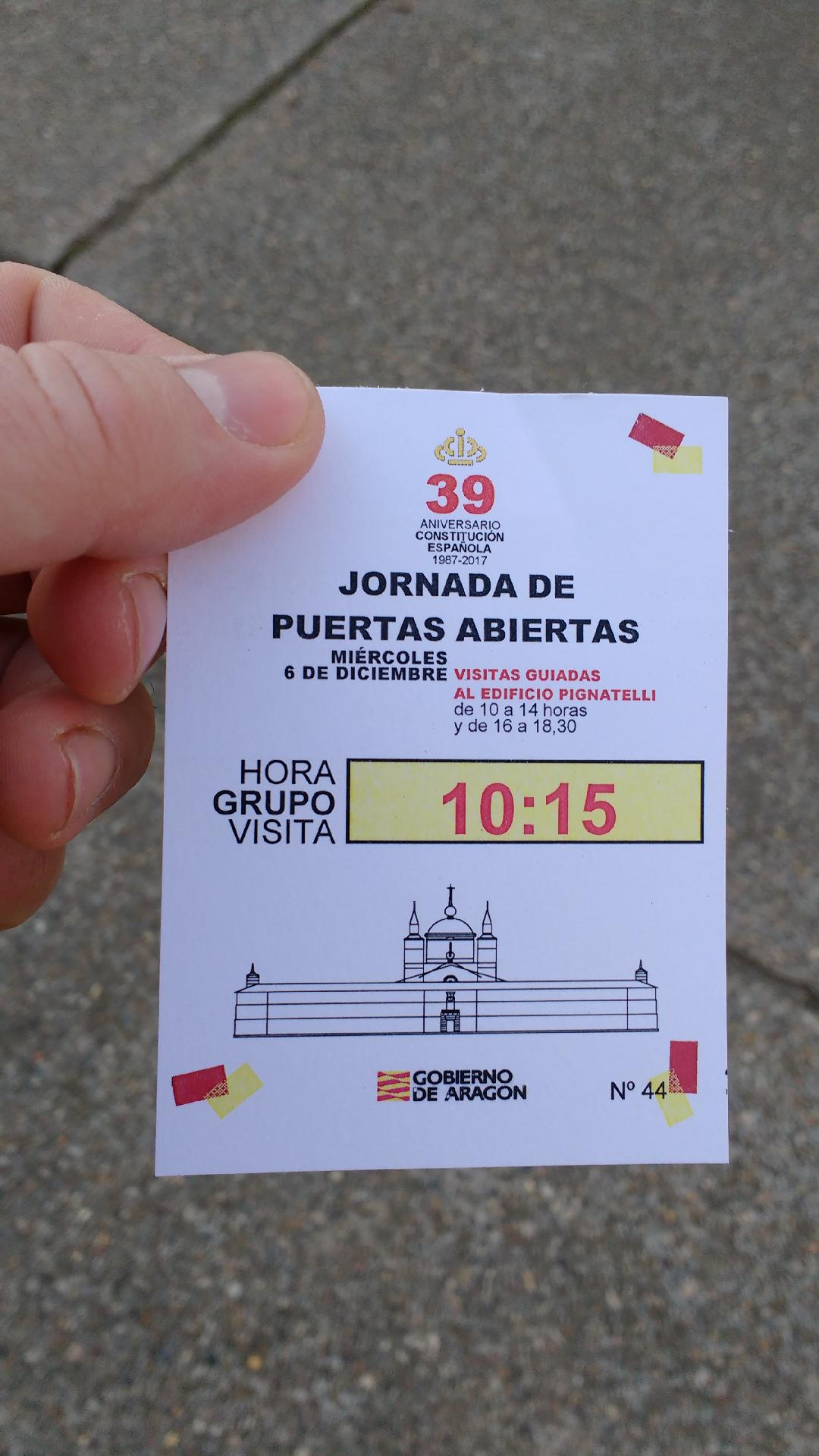 Este es el pase con el que el día la constitución española 6 Diciembre te hacen una visita guiada al edificio